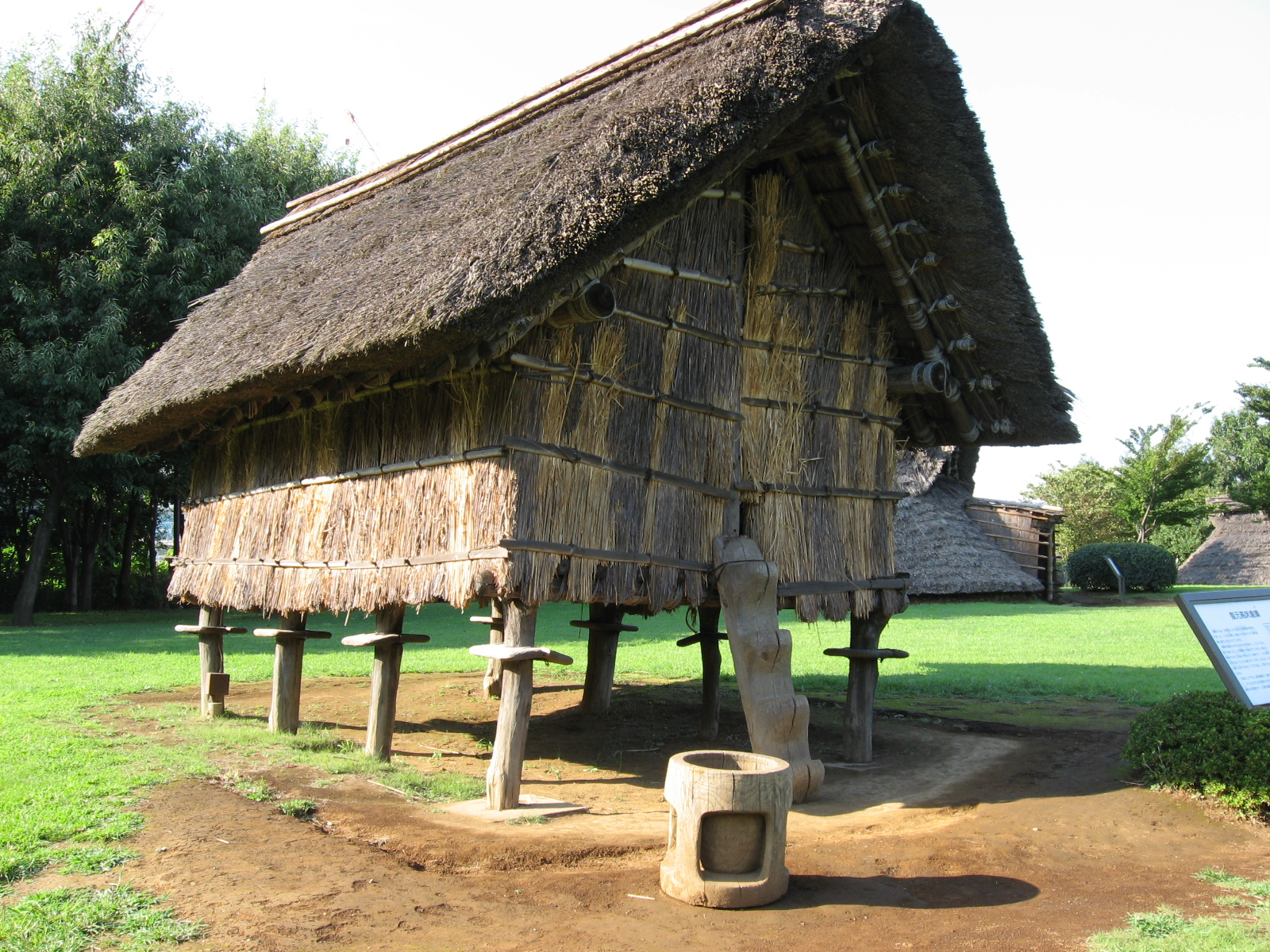 高床式倉庫の復元（大塚・歳勝土遺跡にて）